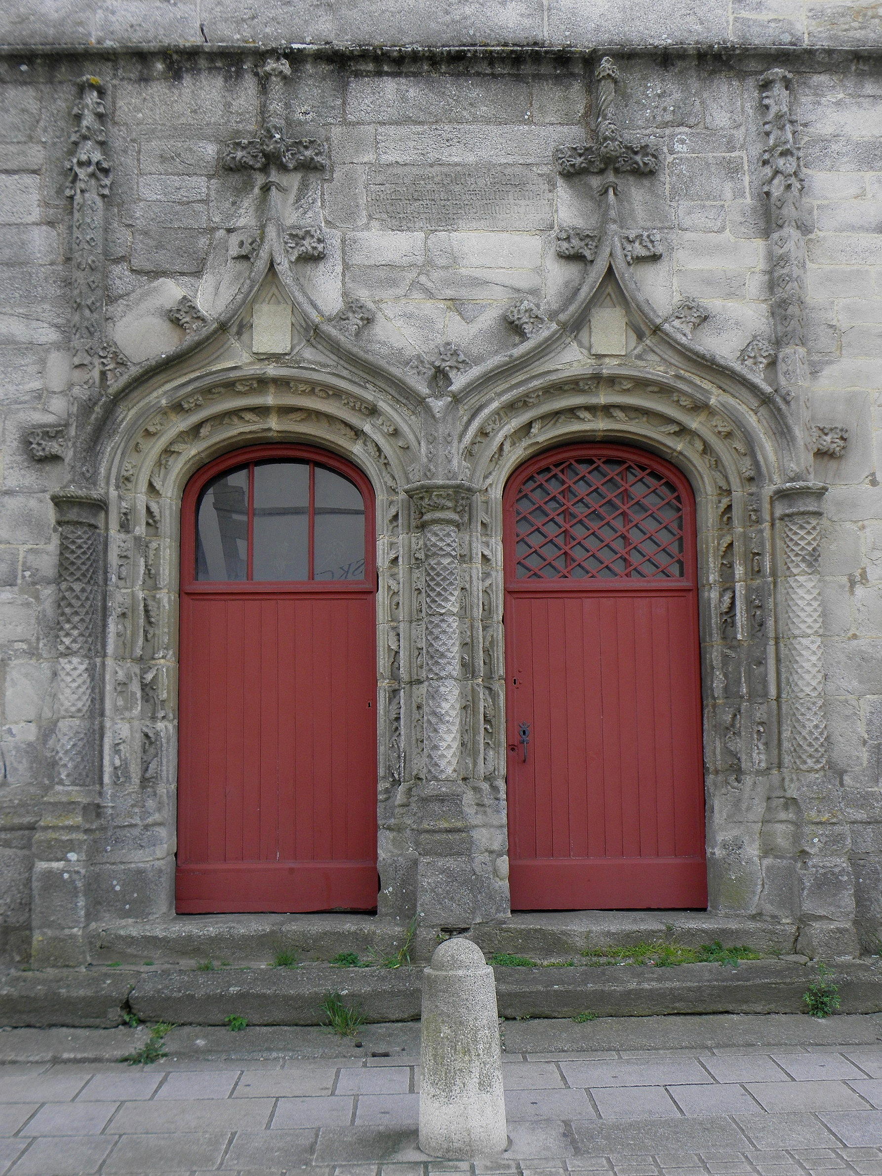 Basilique notre-Dame-de-la-Joie à Pontivy (56). Portail occidental.